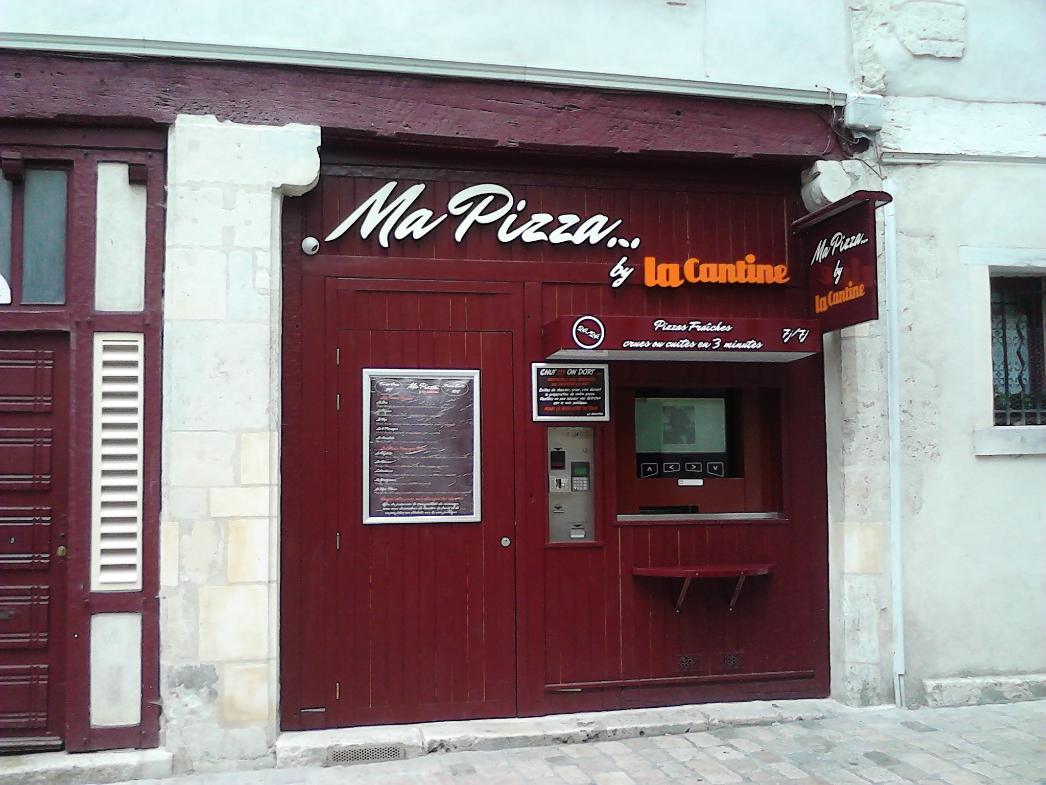 Un distributeur de pizza rue du Poirier à Orléans en France.